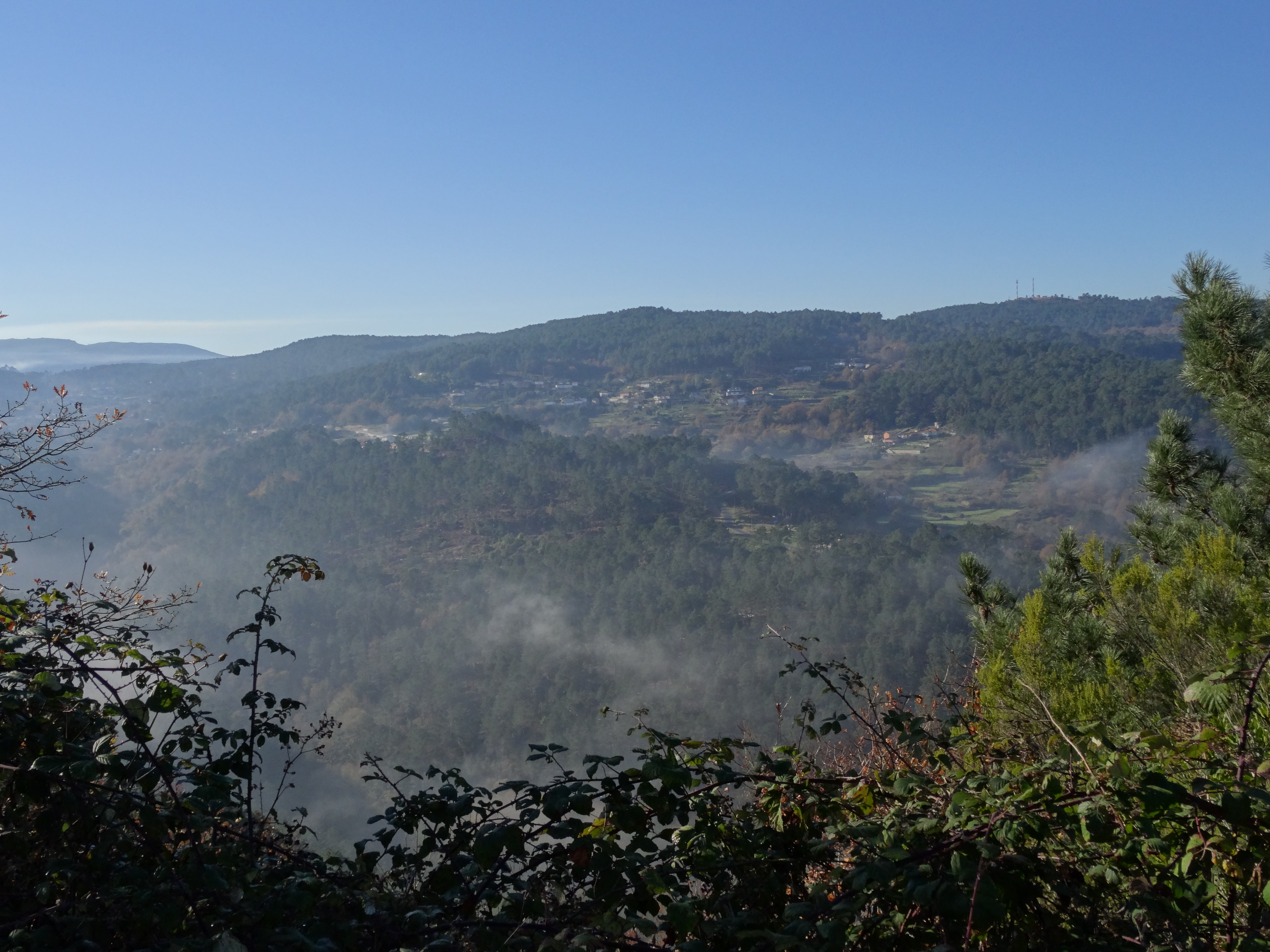 Ver título.